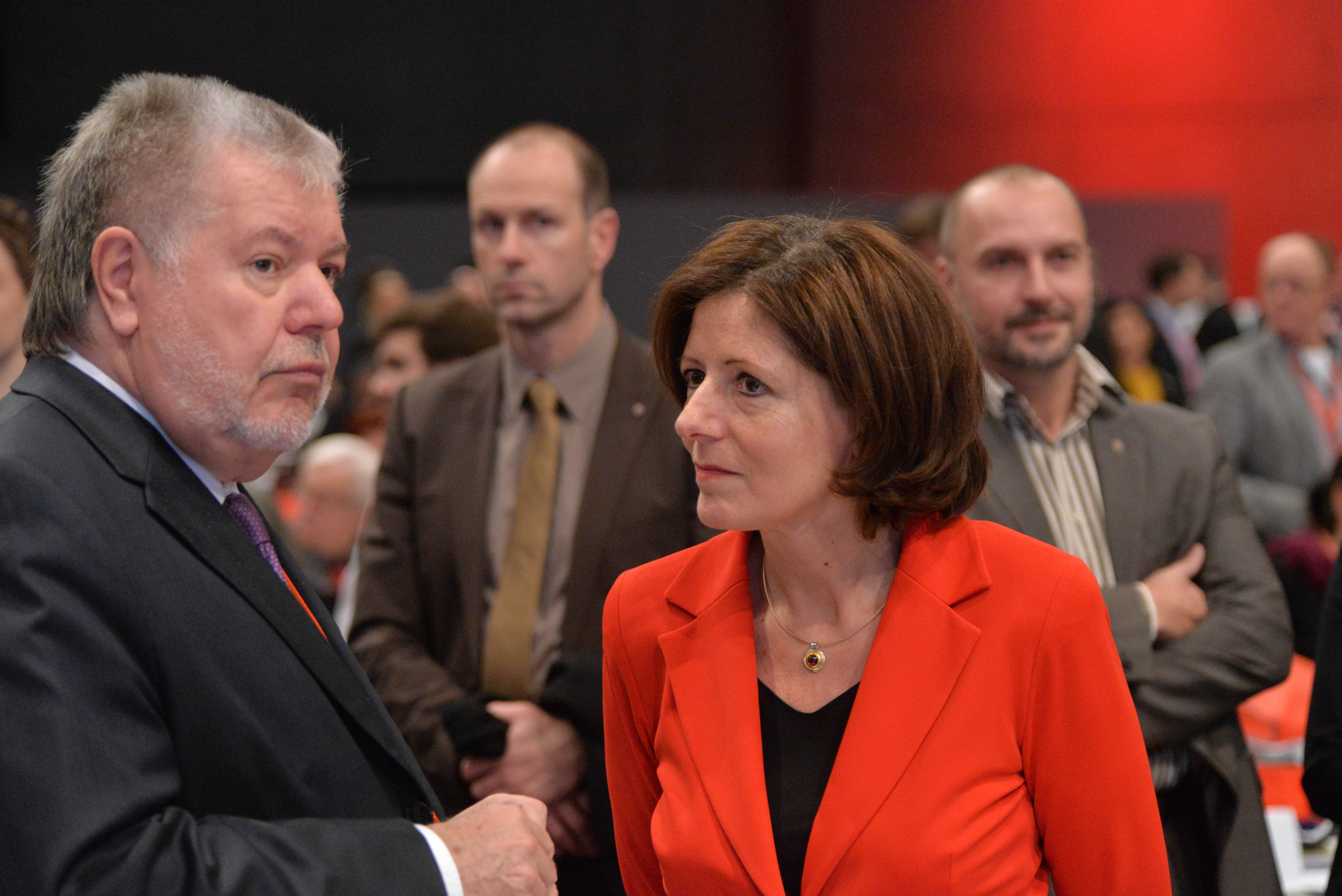 SPD Bundesparteitag Berlin, 10.-12. Dezember 2015, CityCube, Messe Berlin